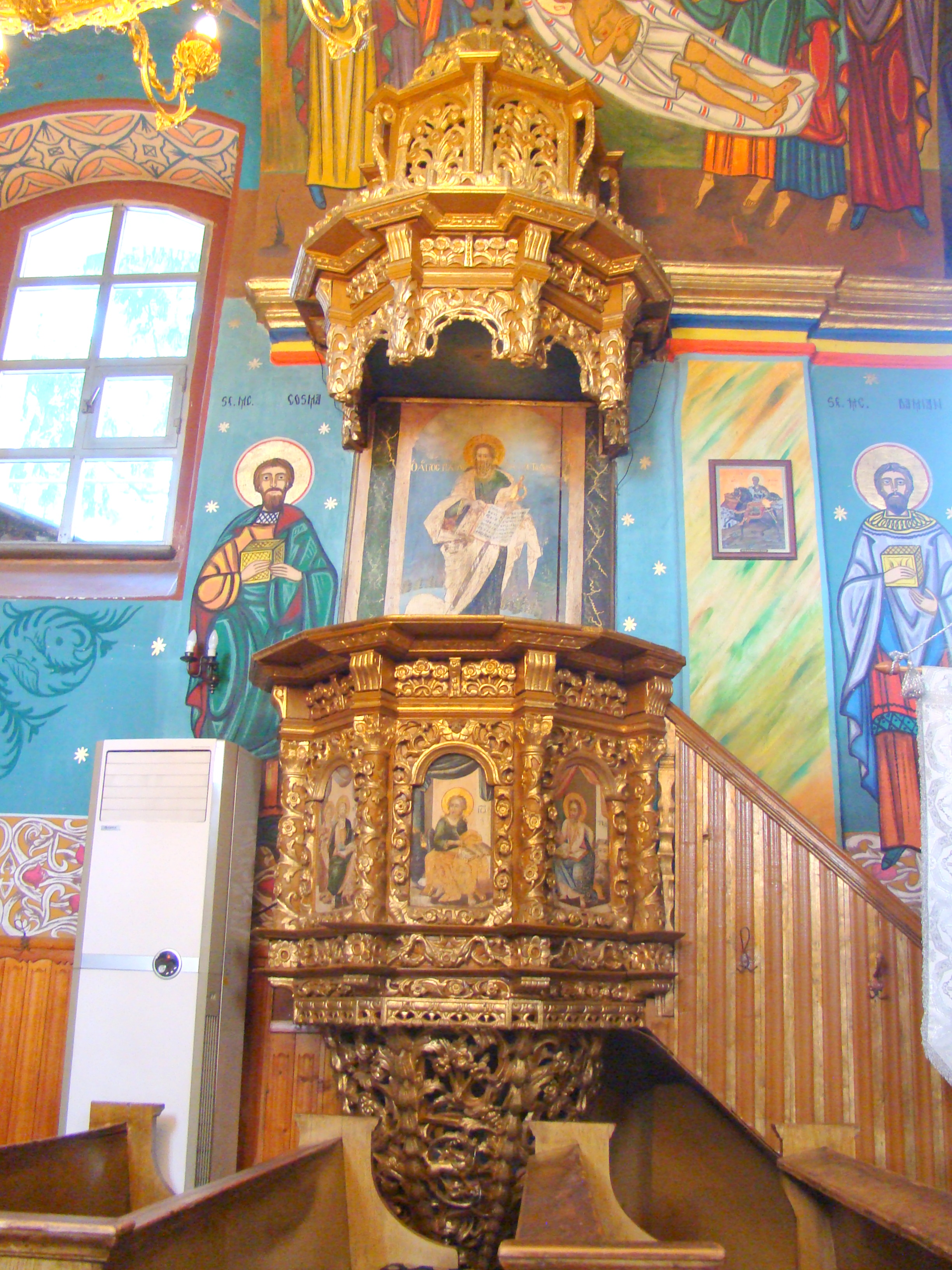 Biserica ortodoxă „Sf. Arhangheli Mihail și Gavriil”, sat Vadu Crișului; comuna Vadu Crișului